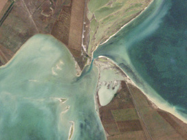 Чонгарский пролив. Вид из космоса.